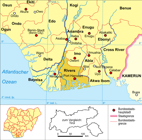 Politische Karte Nigerias (Bundesstaat Rivers hervorgehoben)